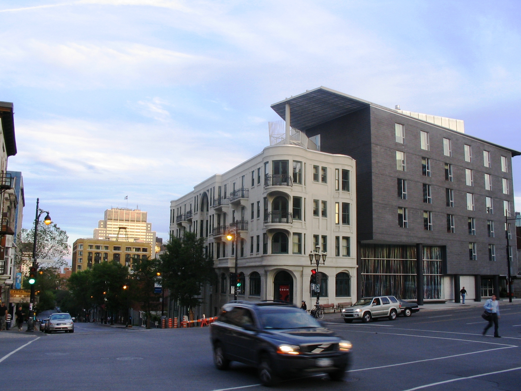 Photo de l'angle Sherbrooke et de la "Main" qui sépare l'est de l'ouest